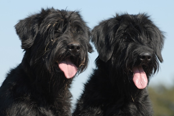 Riezen Schnauzer, ongecoupeerd. Categorie:Afbeelding hond